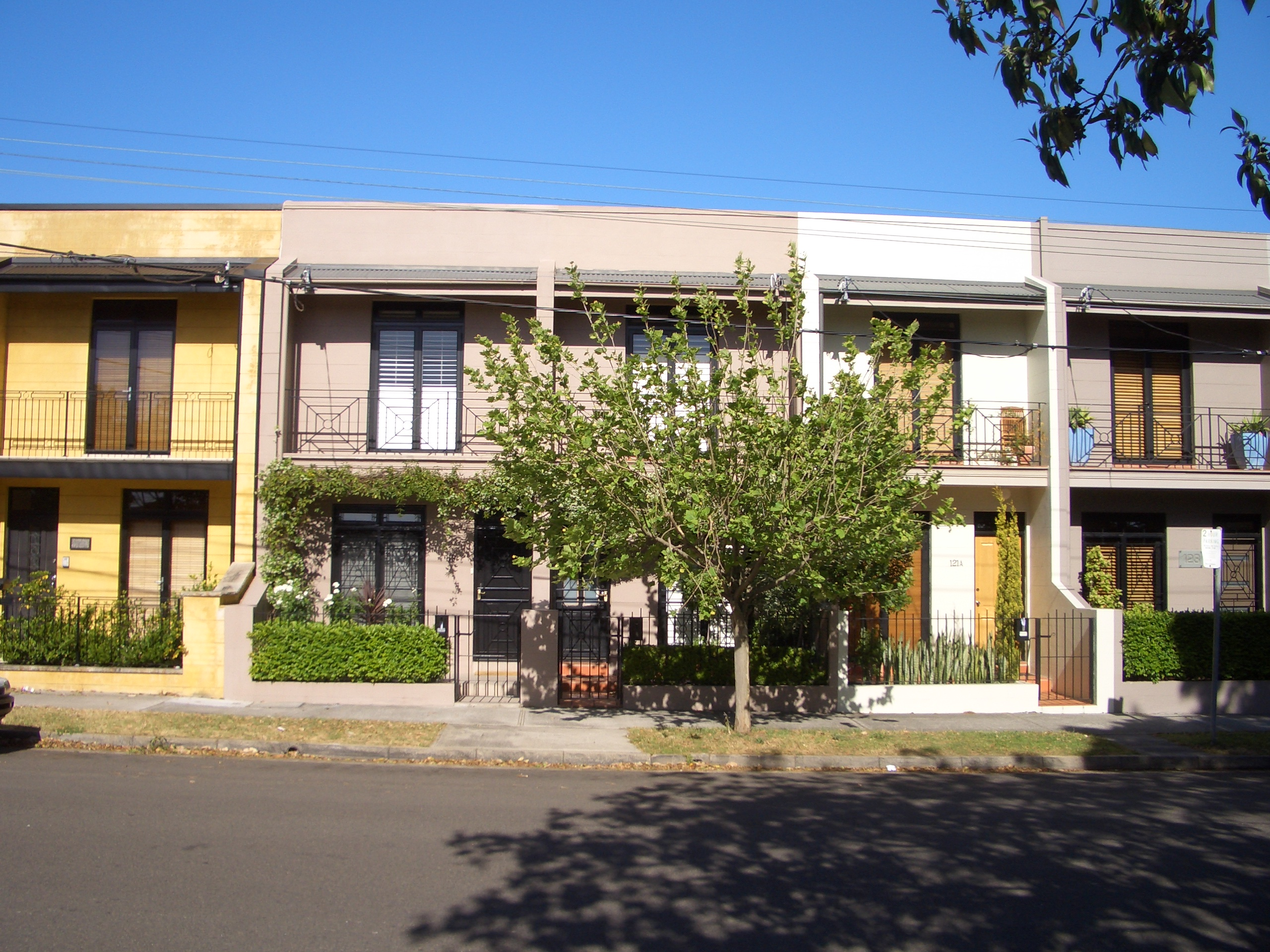 Beaconsfield